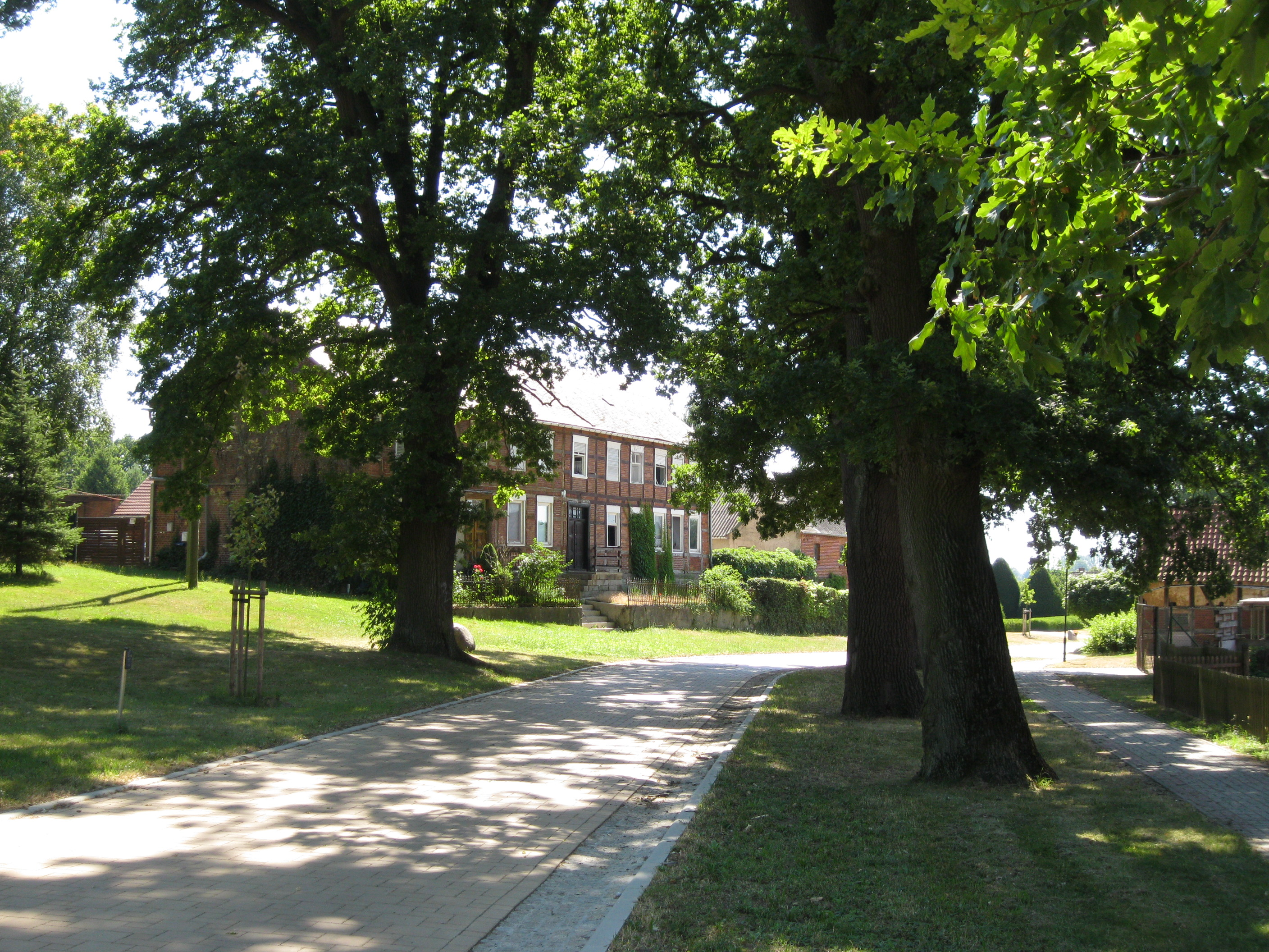 Straße in Lohne im Sommer